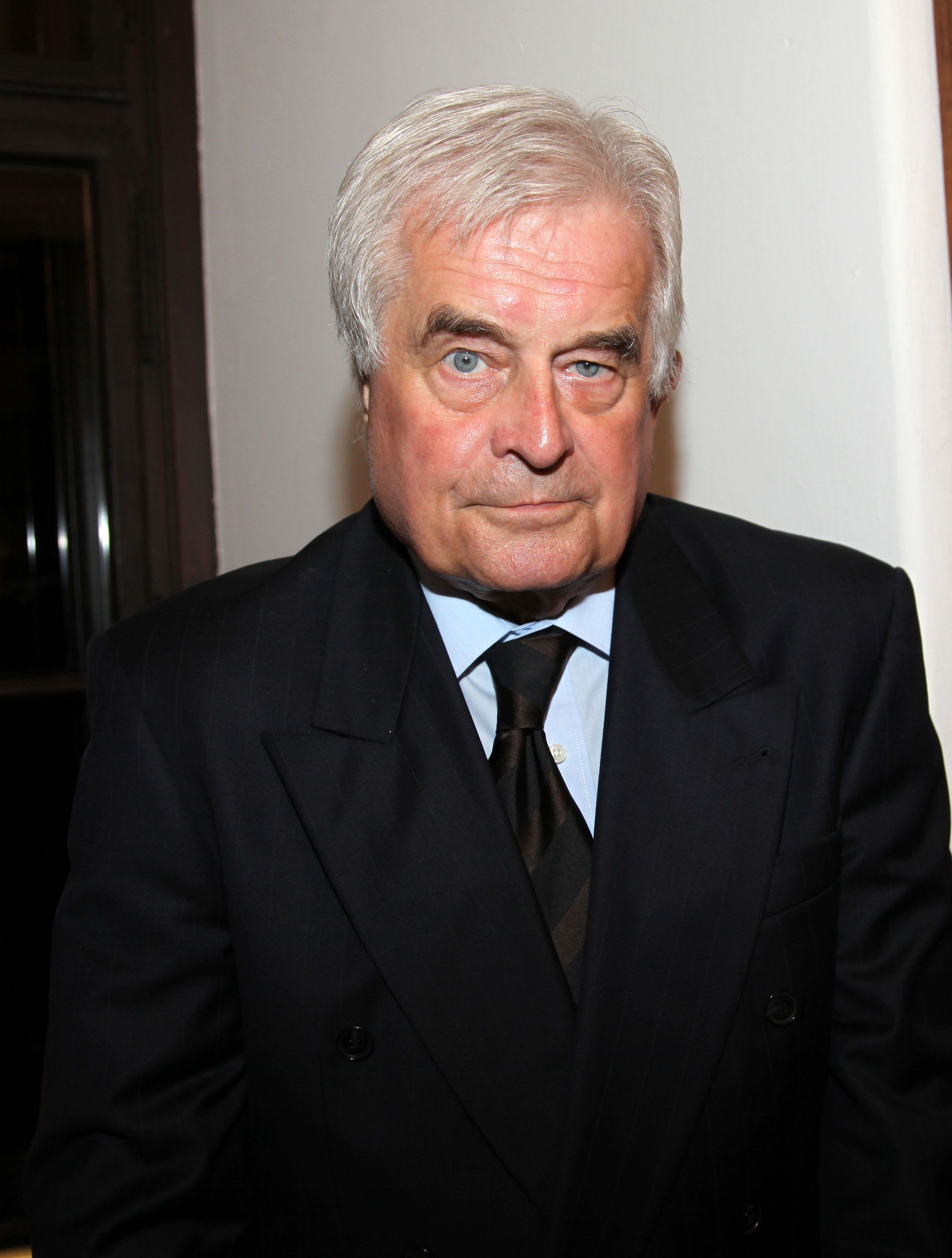 IMG_5282 ; 19.08.2010: Musik-Festival Grafenegg